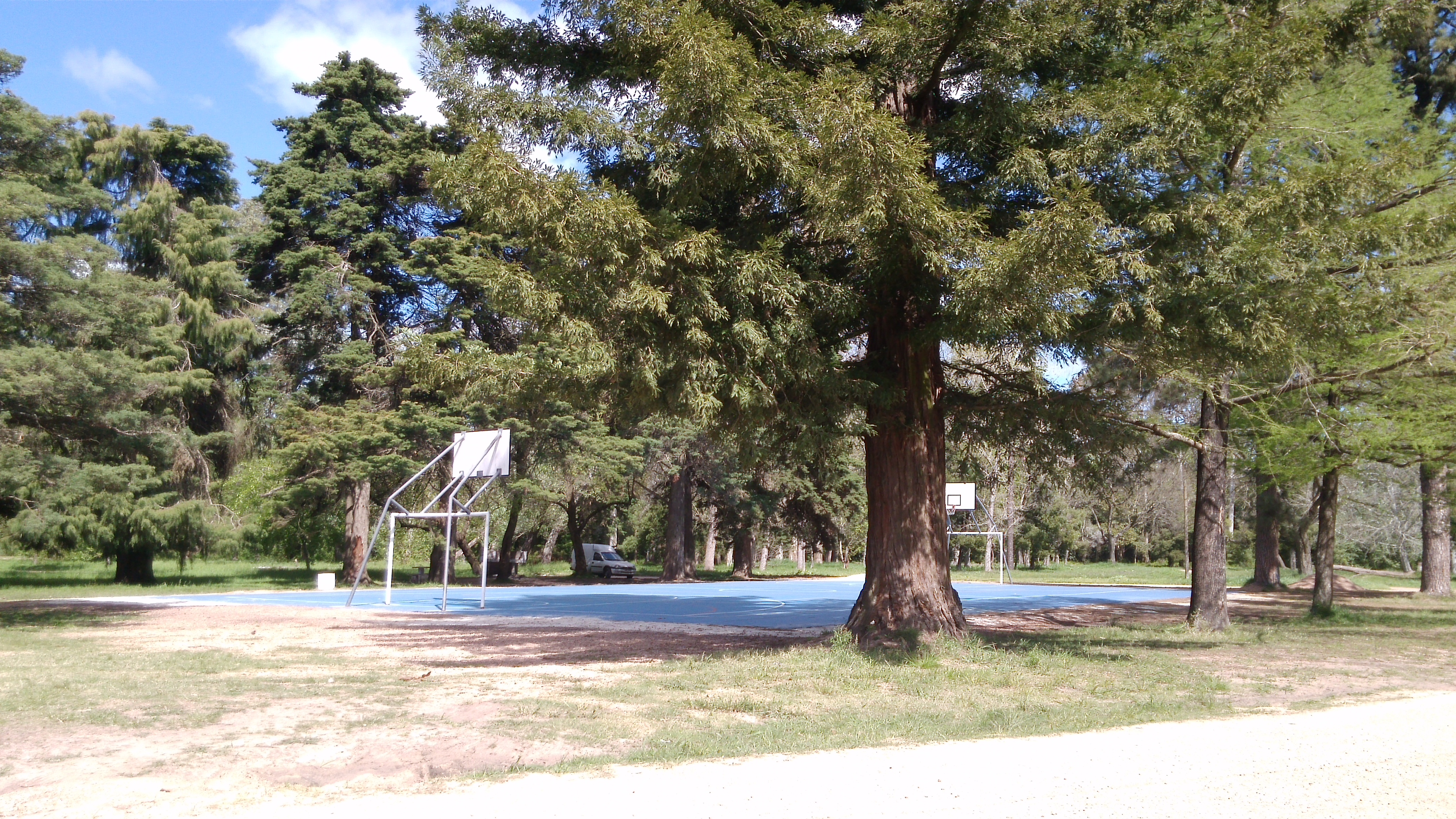 Parque Artigas de Sauce, Canelones, Uruguay.